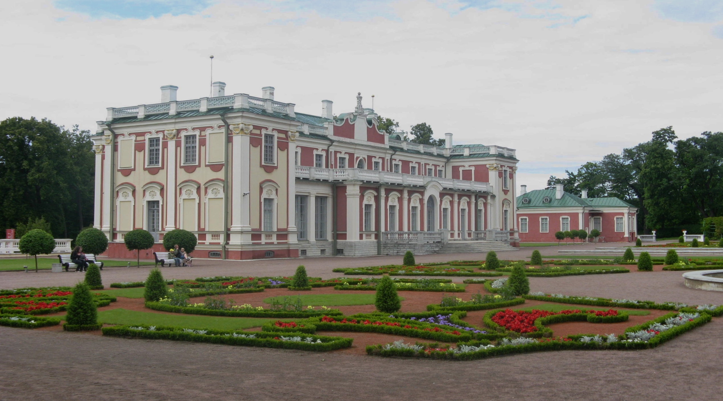 Kadriorgin palatsi Tallinnassa